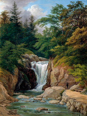 Waldlandschaft mit Wasserfall, 1825